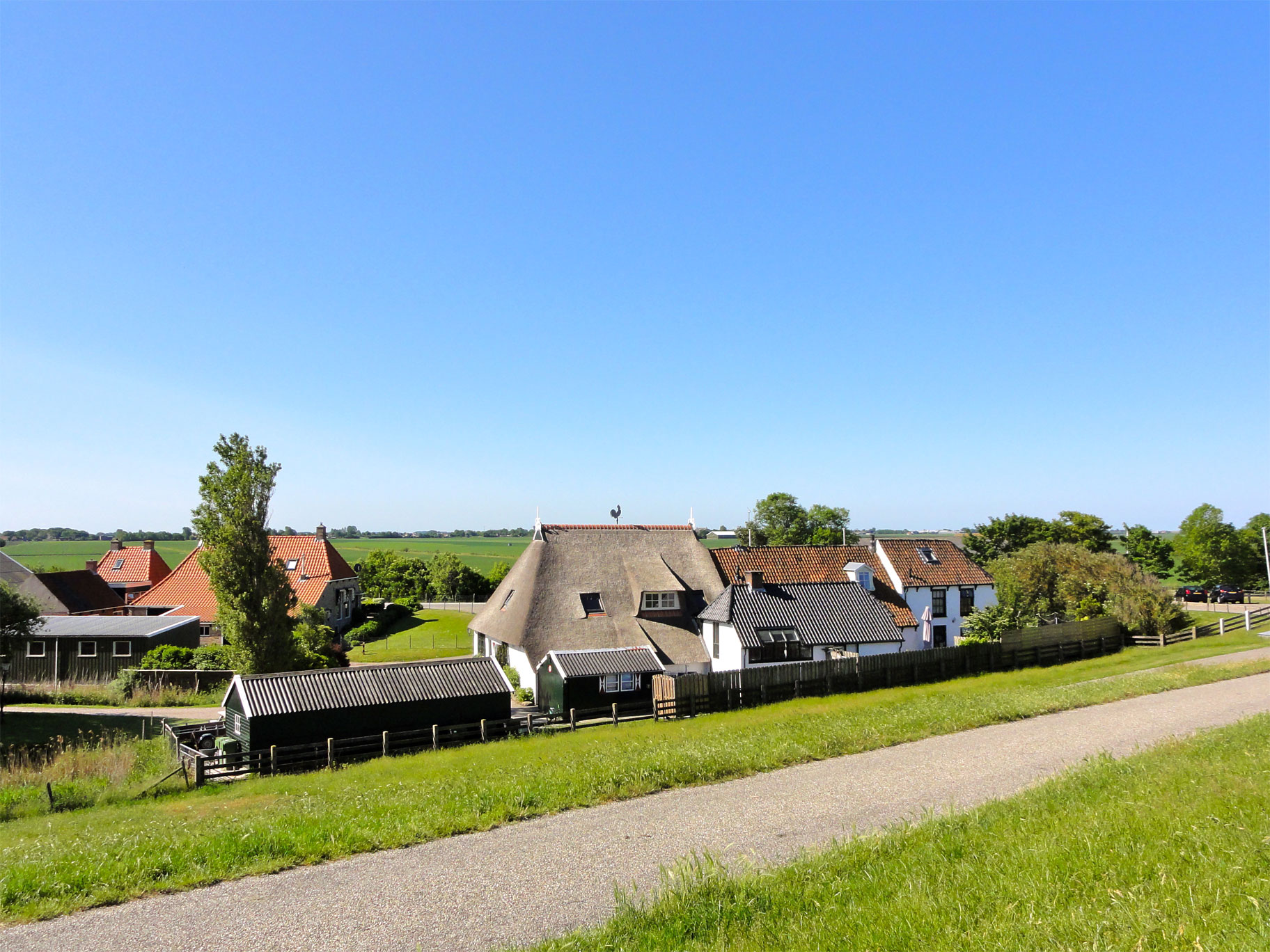 Zicht op Zwarte Haan vanaf de zeedijk